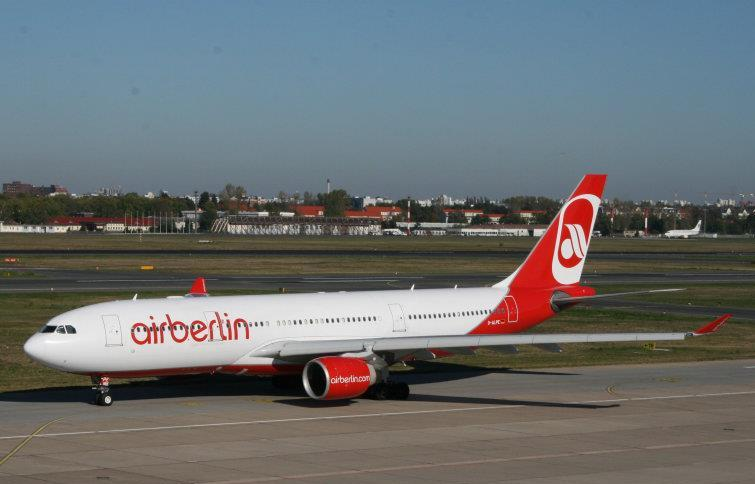 AirBerlin Airbus A330 am Flughafen Berlin-Tegel